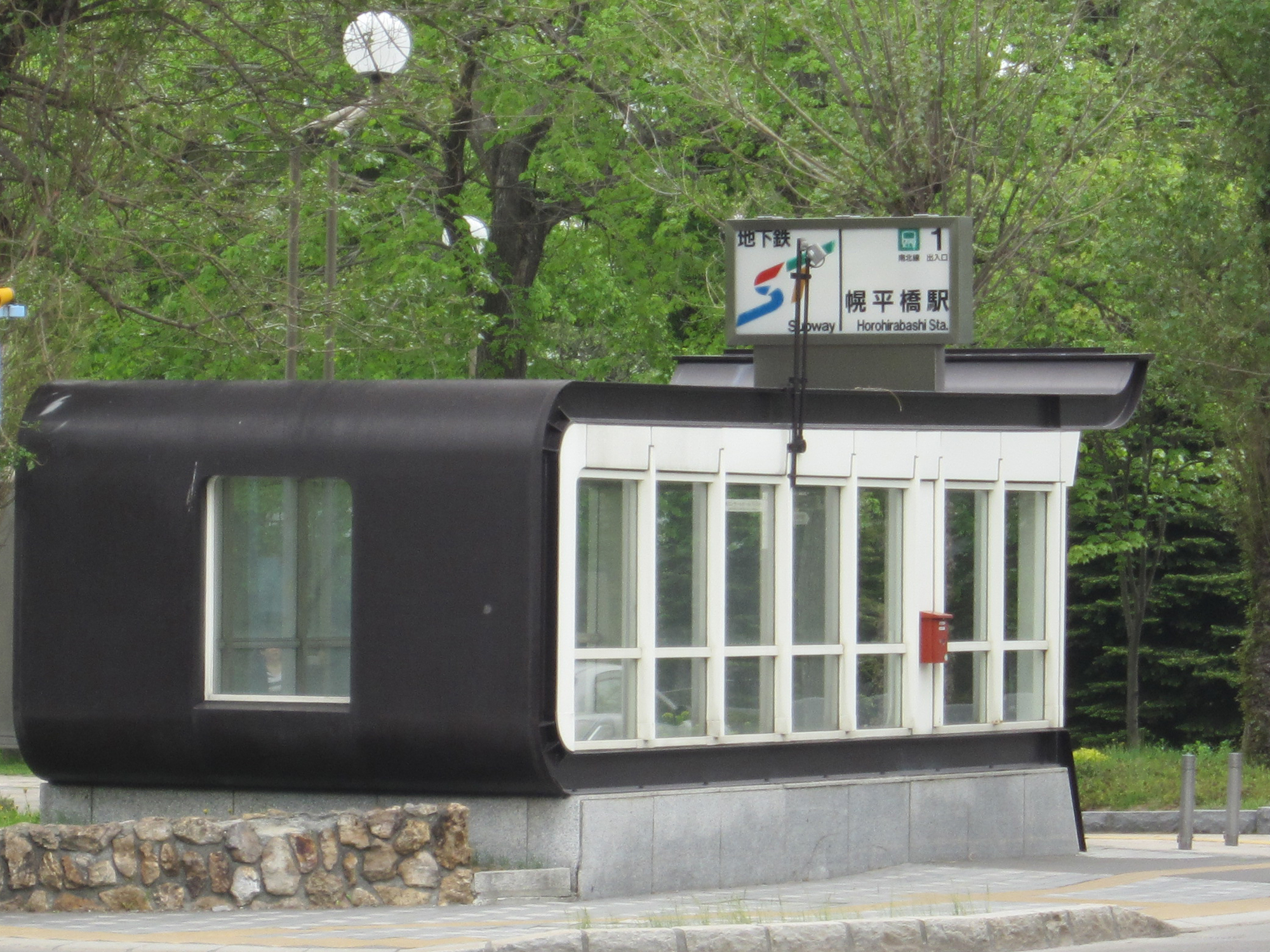 札幌市営地下鉄南北線幌平橋駅1番出入口